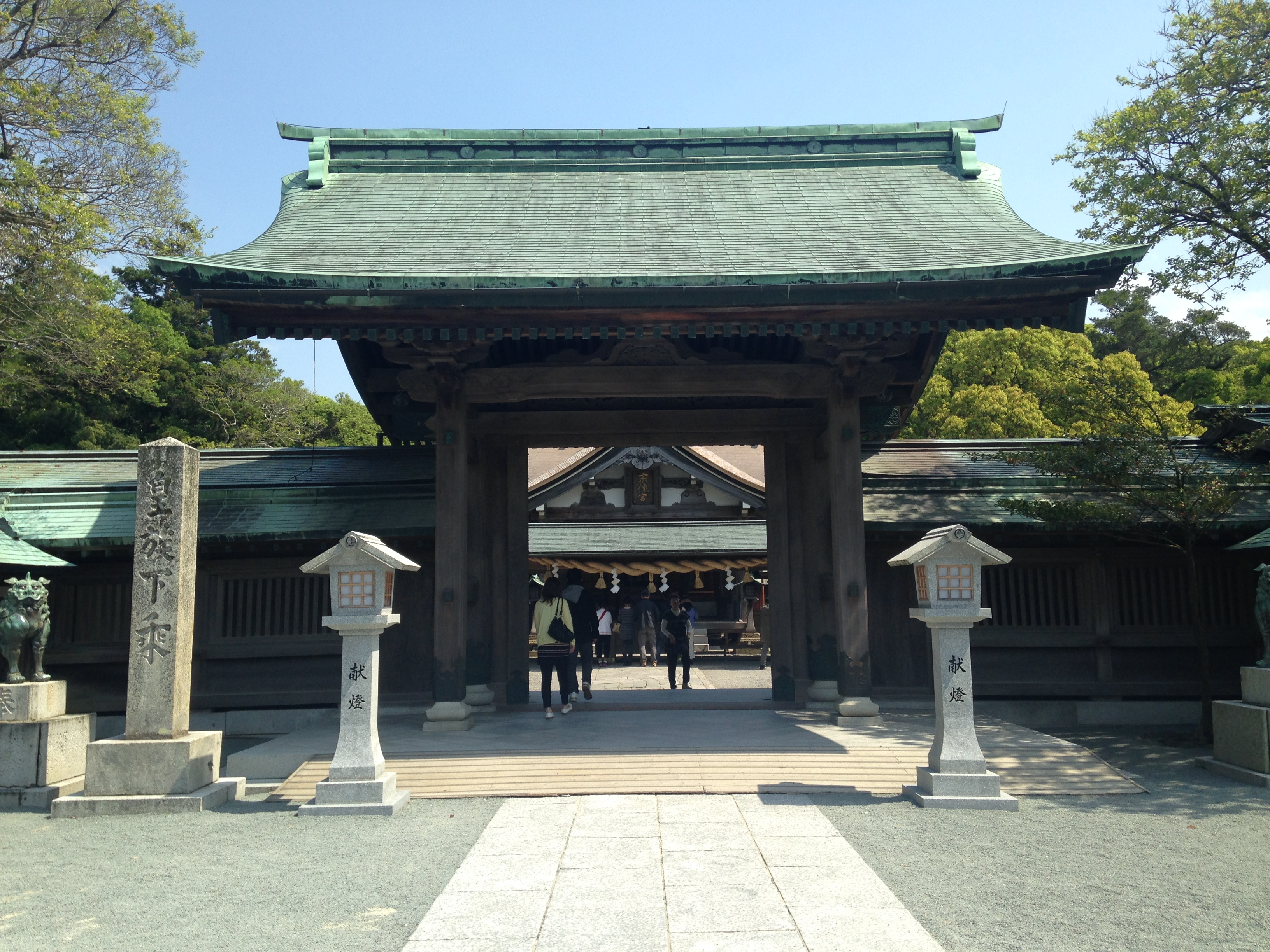 宗像大社(辺津宮)の神門